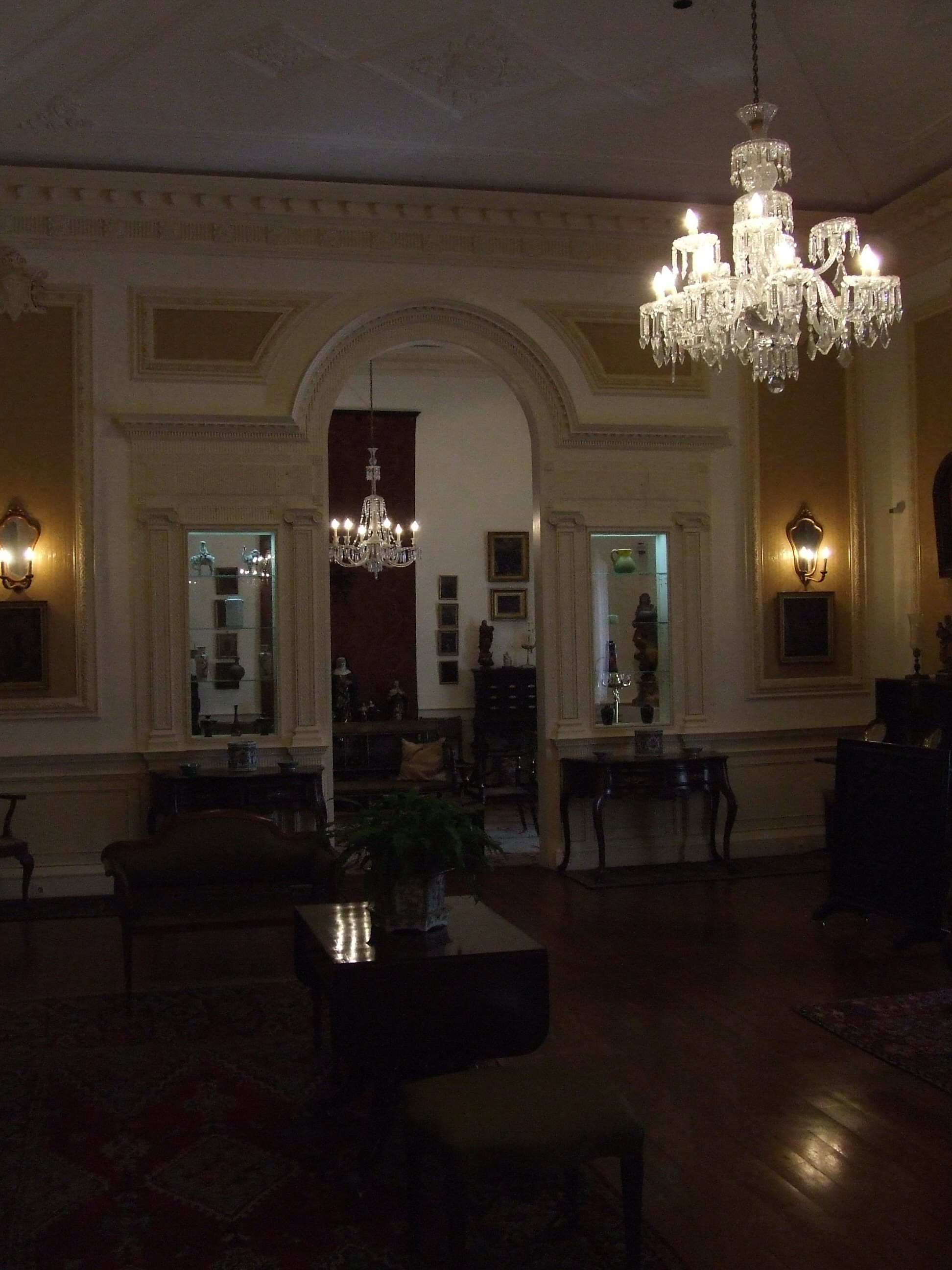 Madeira - Funchal - Frederico de Freitas House Museum